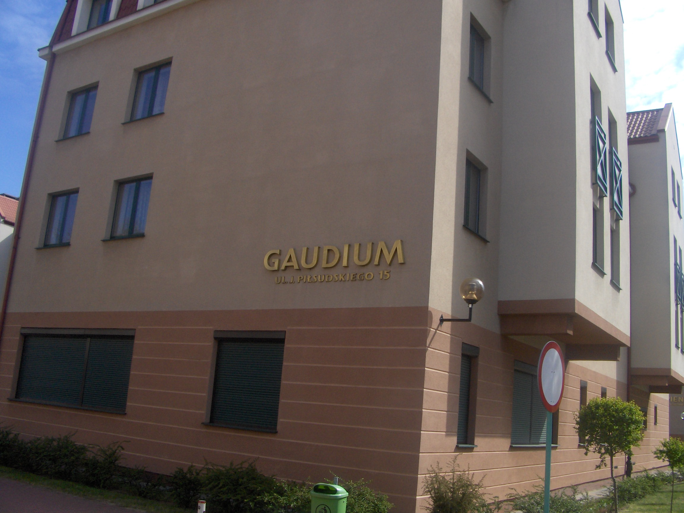 Dom Studencki "Gaudium przy ul. Piłsudskiego 15 w Słubicach. Author: me, Poznaniak 1975 (